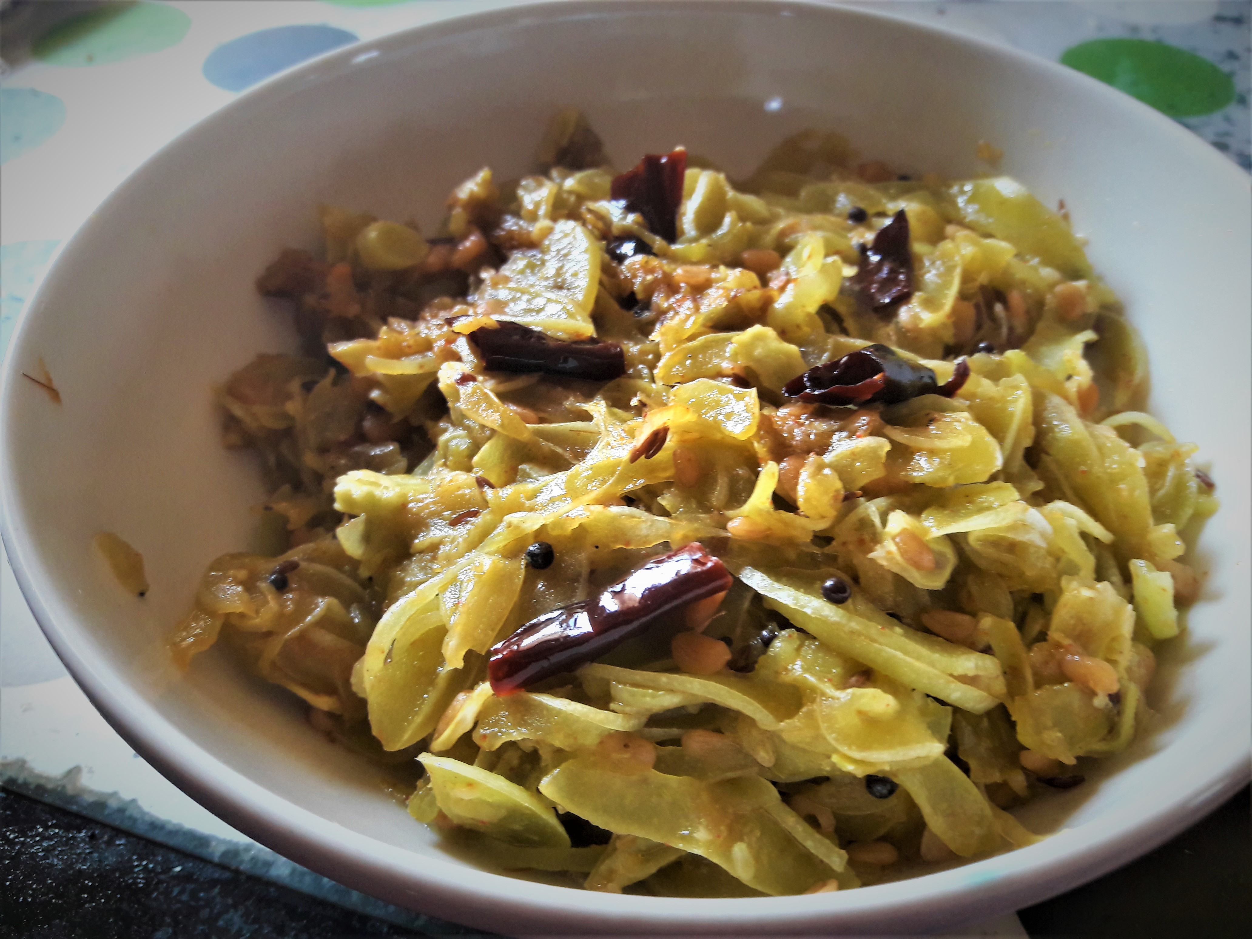 పొట్లకాయ పోపు కూర